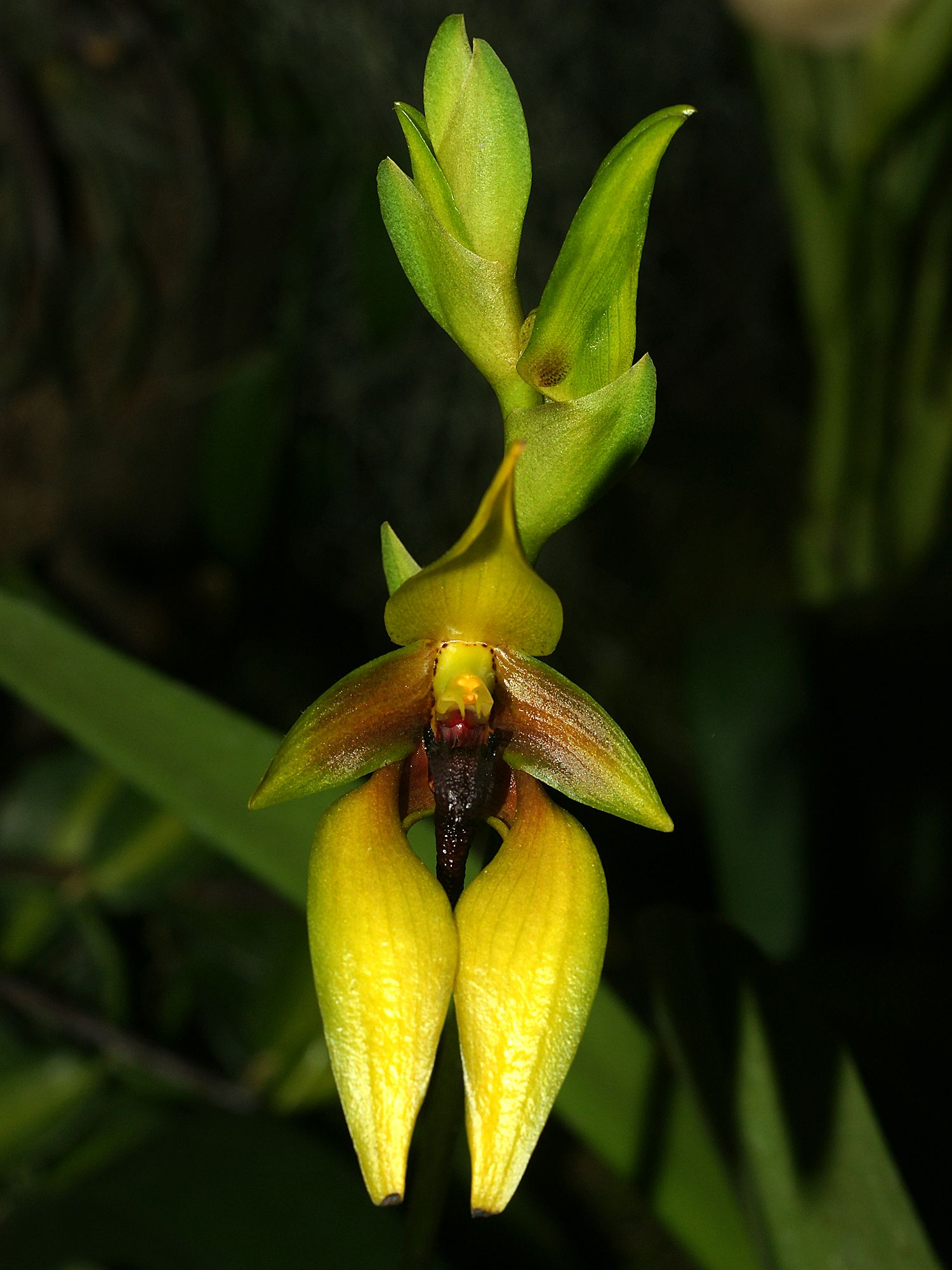 Bulbophyllum amplebracteatum subsp. carunculatum